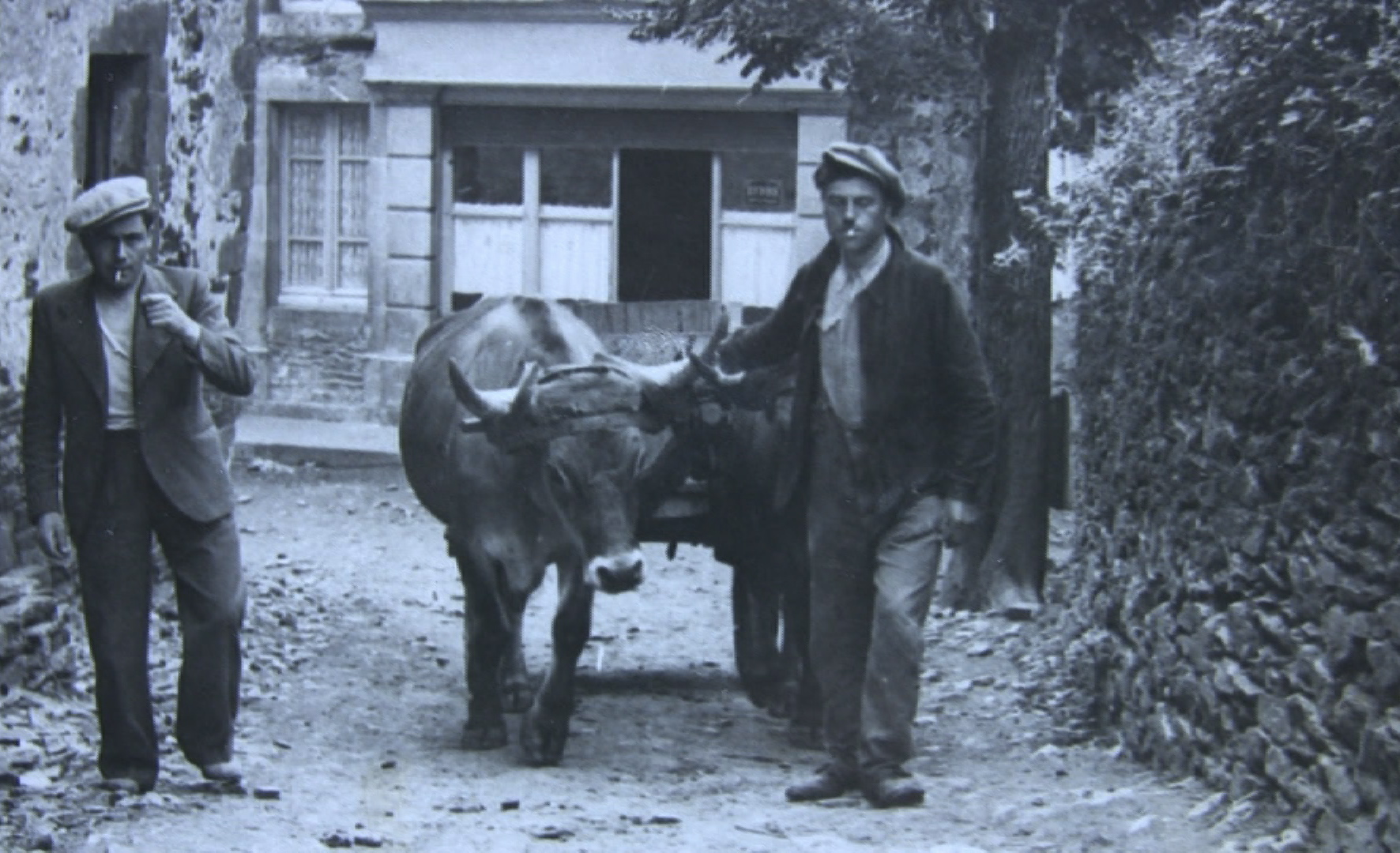 André Sanhet et Raymond Gaillard devant le café Cayzac à Pomayrols (Aveyron, France).